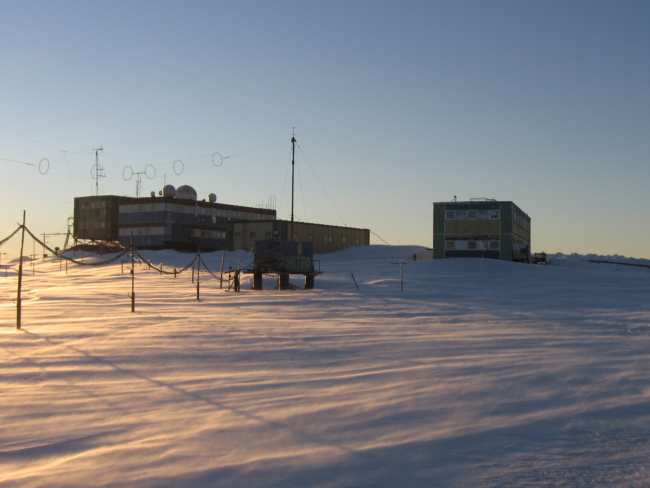 Сопка Радио 2007